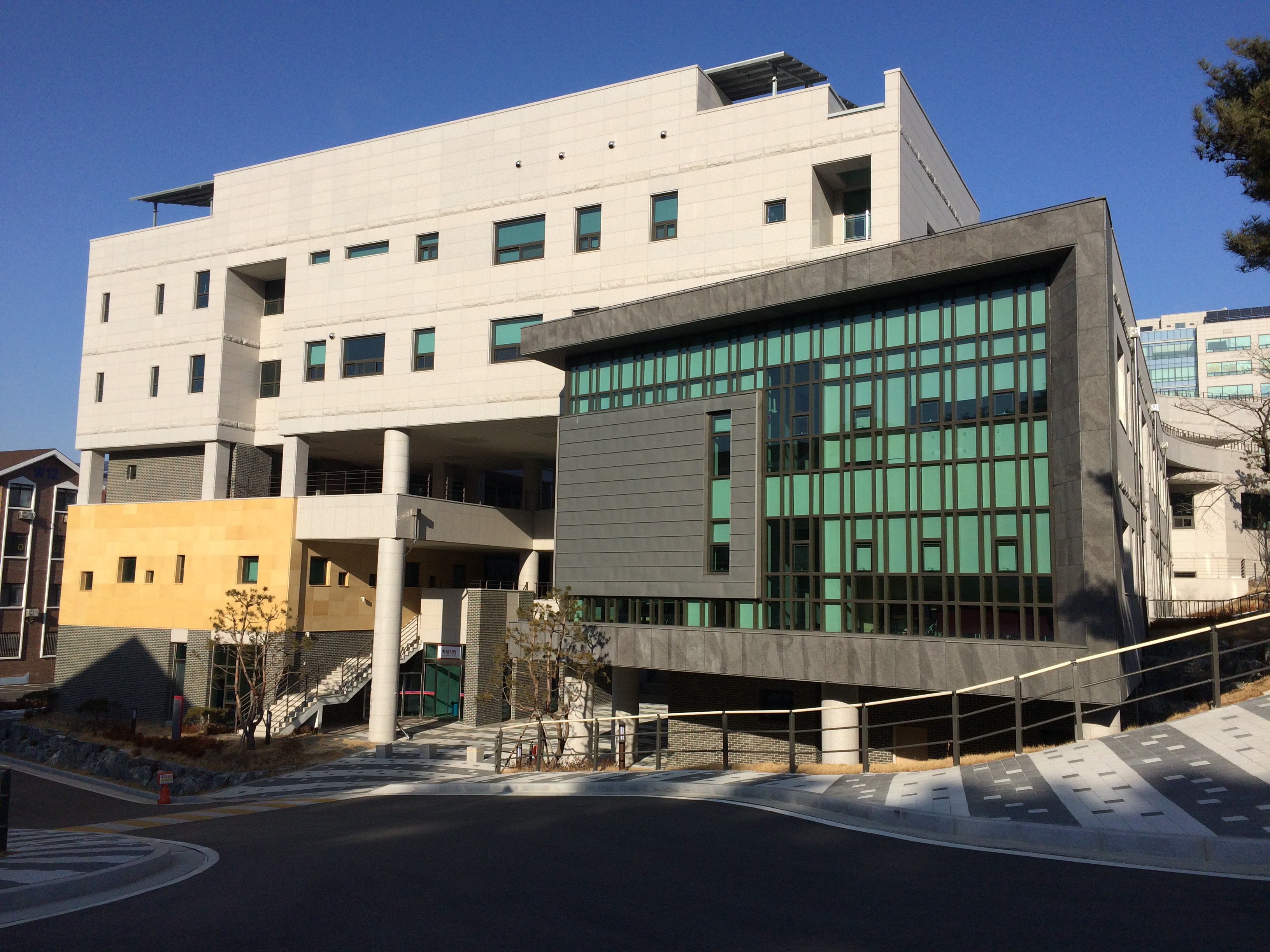 강릉원주대학교 원주캠퍼스에 위치한 학생복지관. 이 건물에 학생식당, 교직원식당, 체력단련실, 생활협동조합 카페, 편의점 등 다양한 복지를 위한 시설이 위치해있다.